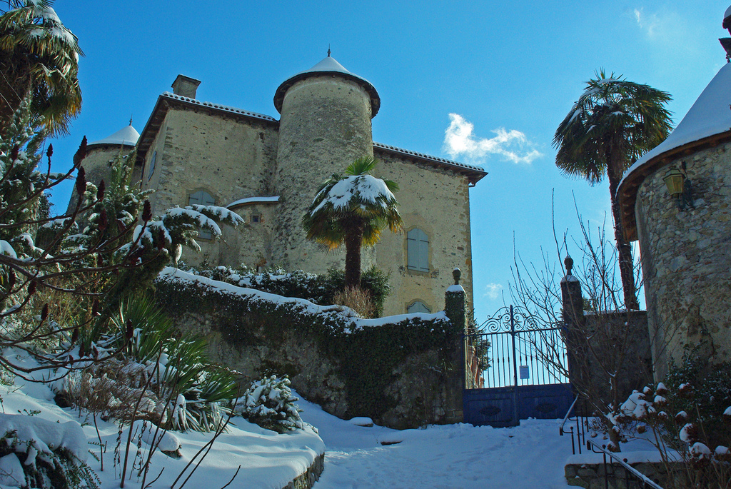 Maison-forte ou château de Seix (Ariège, France) .